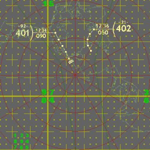 grafische Darstellung einer Luftlagekarte der ehemaligen NVA, hier für den Standort der Fla-Raketenabteilung FRA-234 Weggun (Uckermark)